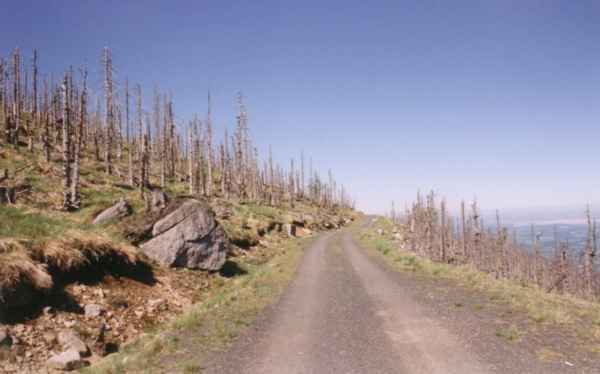 Neuartige Waldschäden („Waldsterben“): Völlig devastierter Waldhang mit abgestorbenen Fichten Picea abies im tschechischen Erzgebirge - Hauptursache für dieses großflächige Absterben waren die Rauchgase aus veralteten tschechischen Braunkohlekraftwerken.